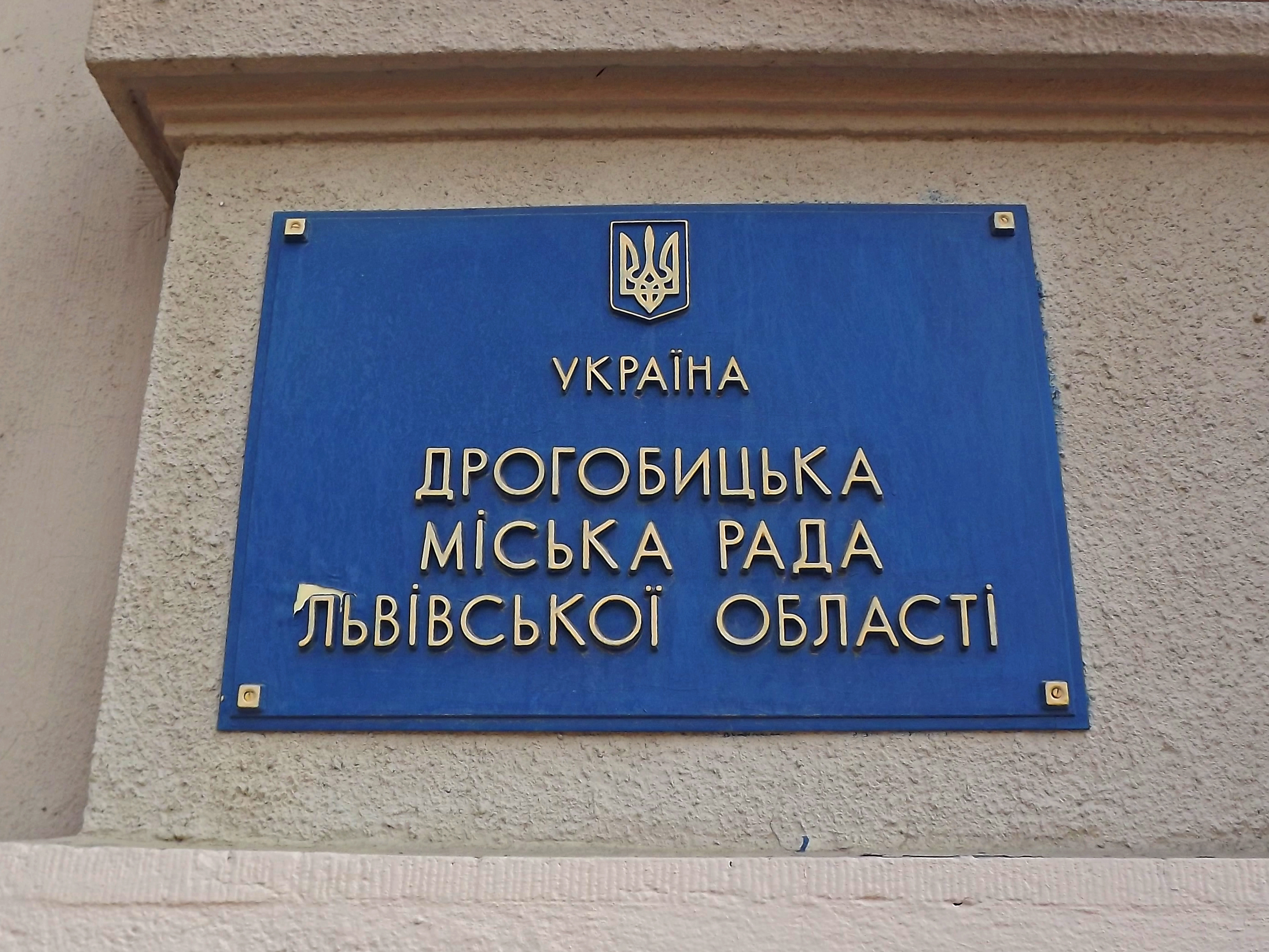 Ратуша (будинок магістрату), Дрогобич, пл. Ринок, 1